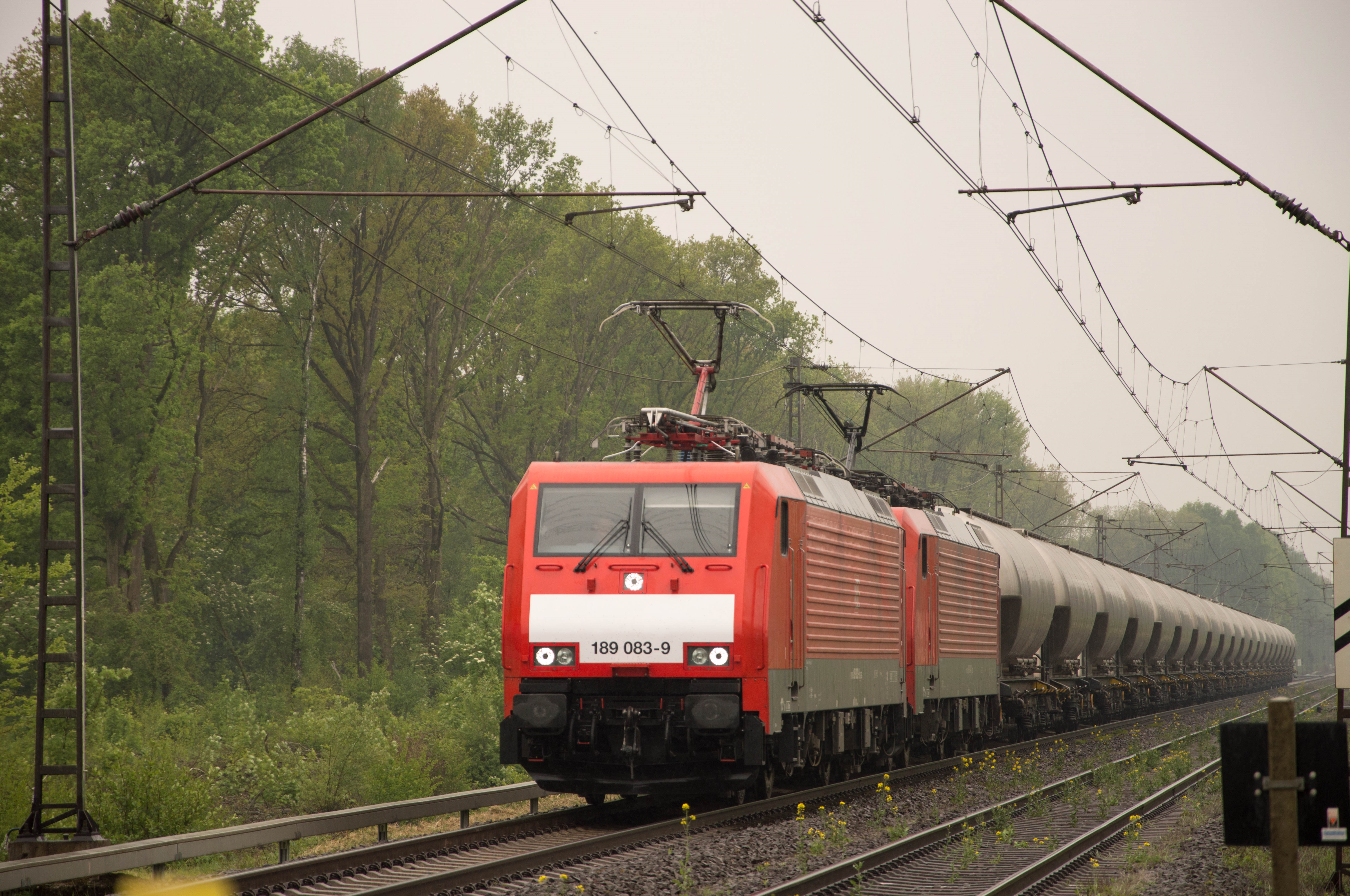 DB Schenker 189 083-9 en onbekende 189-serie met Silo Ketelwagens bij Elten. DB Schenker 189 083-9 and unknown series with tank wagons at Elten